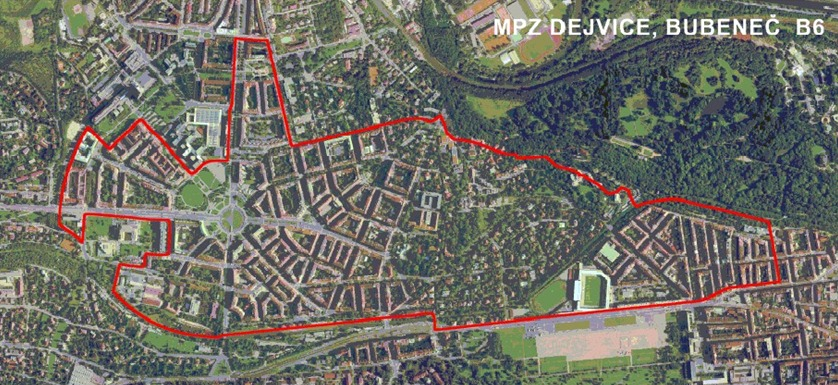 Mapa městské památkové zóny Dejvice, Bubeneč, horní Holešovice, část Dejvice, Bubeneč.